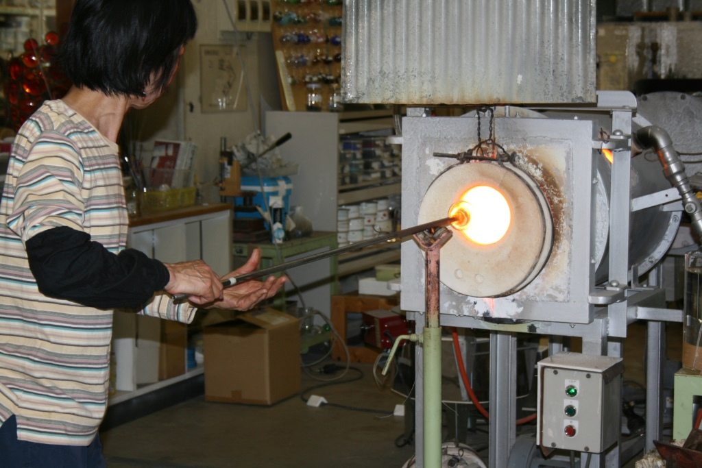 吹きガラス講座風景